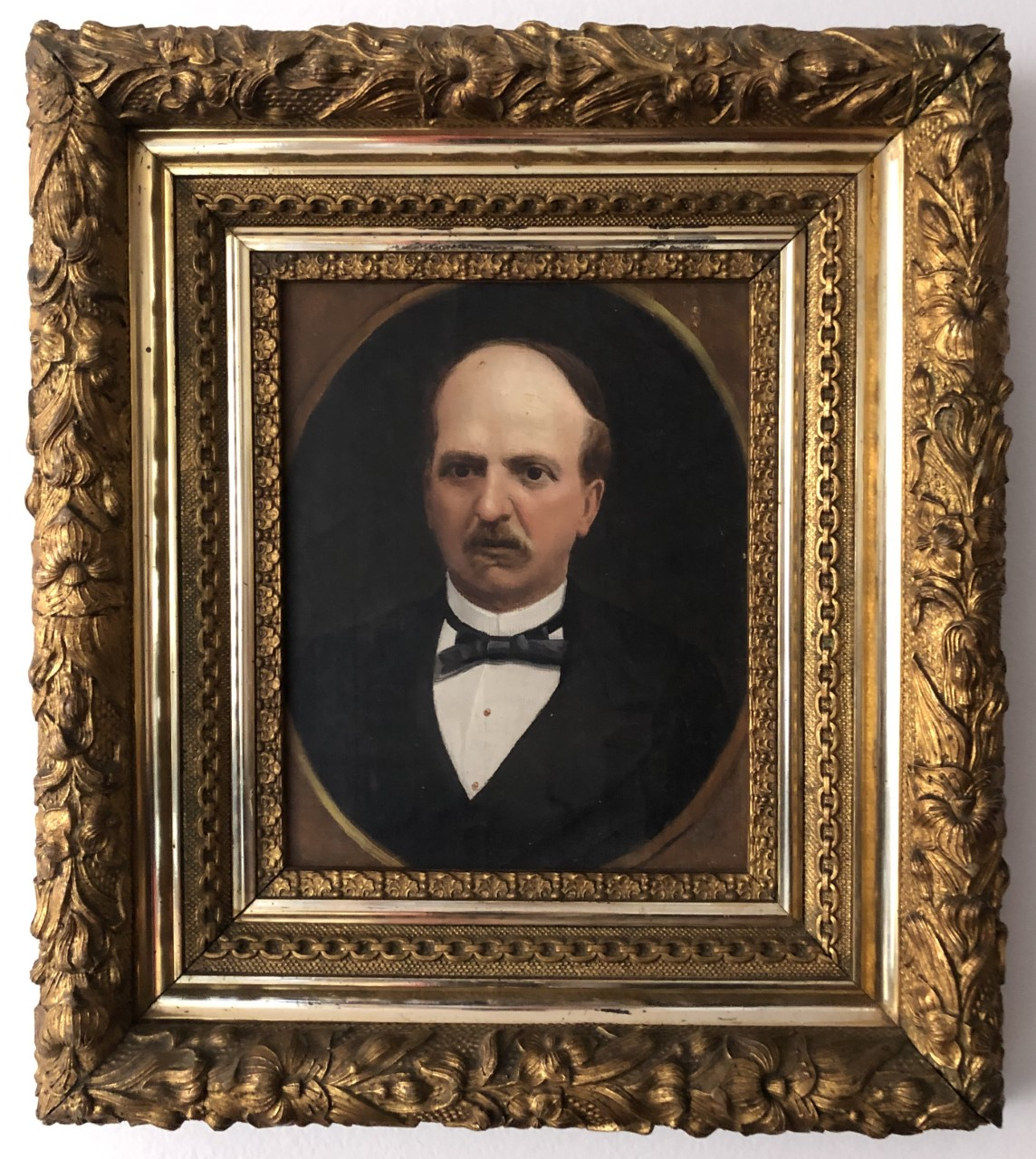 Retrato al óleo del abogado y político colombiano Miguel Arroyo Hurtado